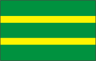 Kabala valla lipp.